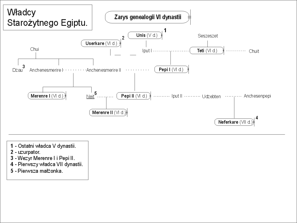 Starożytny Egipt - genealogia VI dynastii.